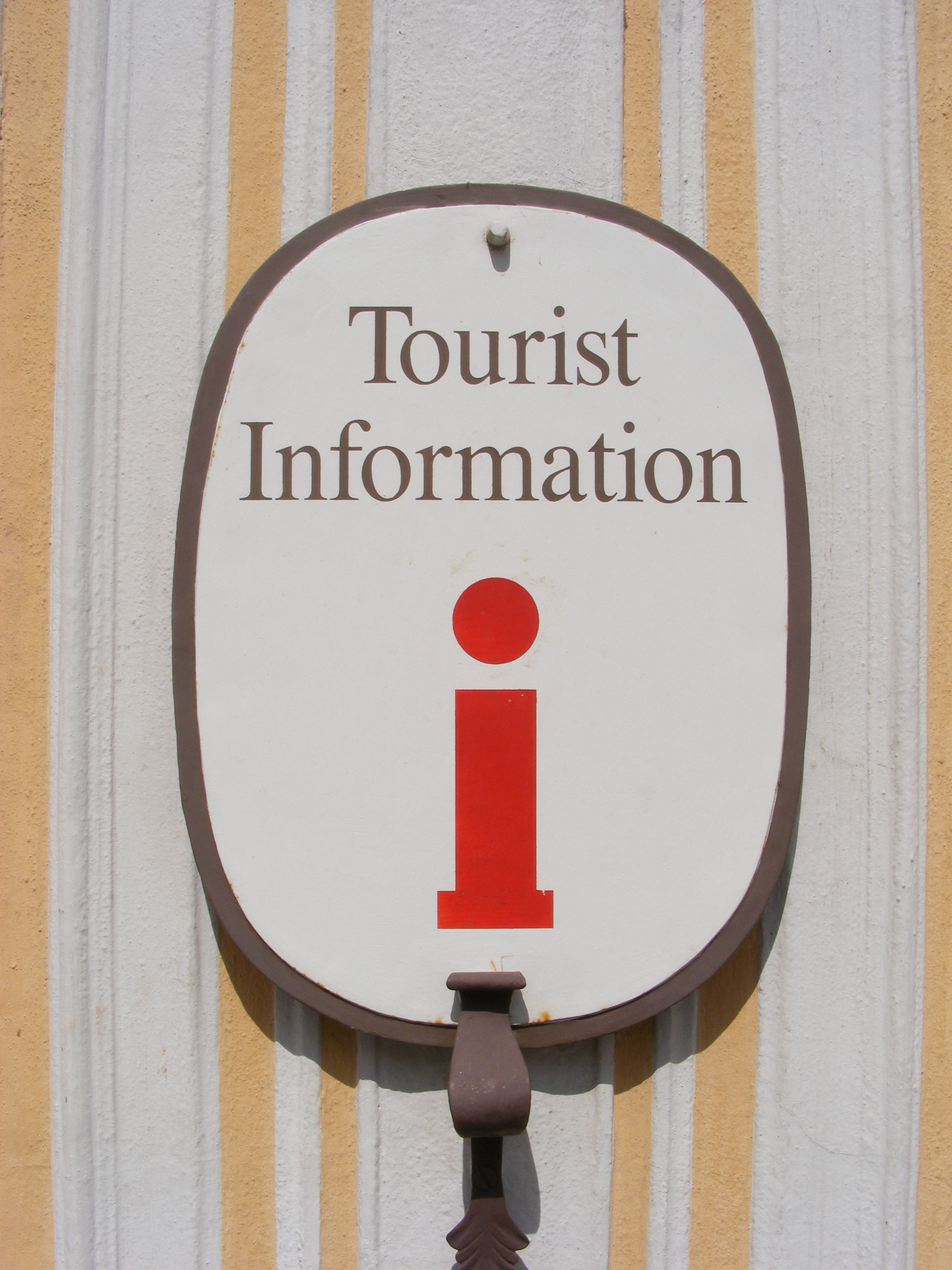 Schild "Tourist Information" am Falkenhaus (Würzburg).